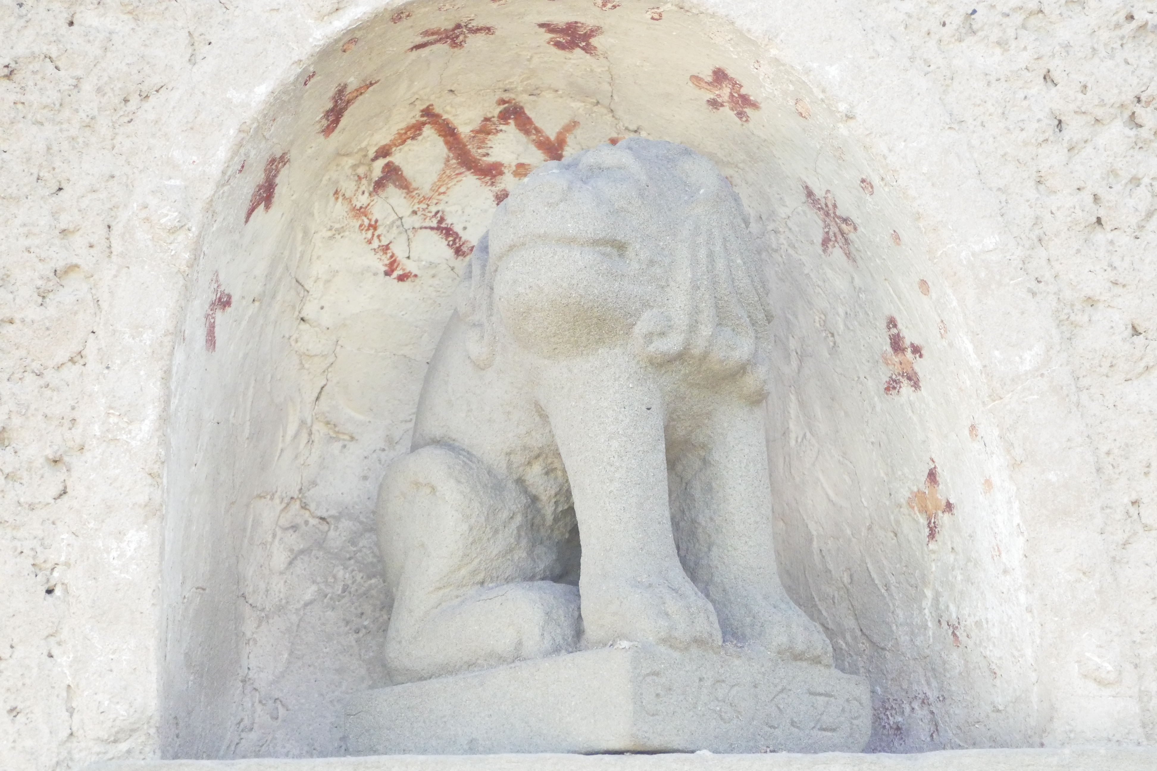 Figura zoomorfa presso Roncopianigi